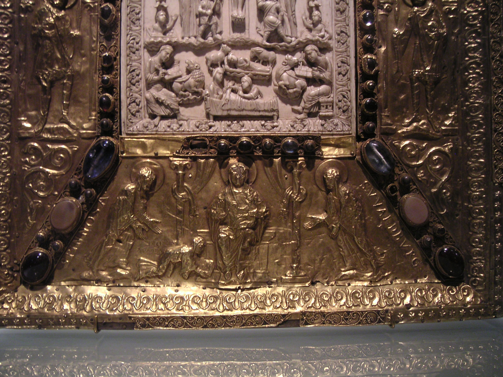 Stifterbild des Theophanu-Evangeliars im Essener Domschatz